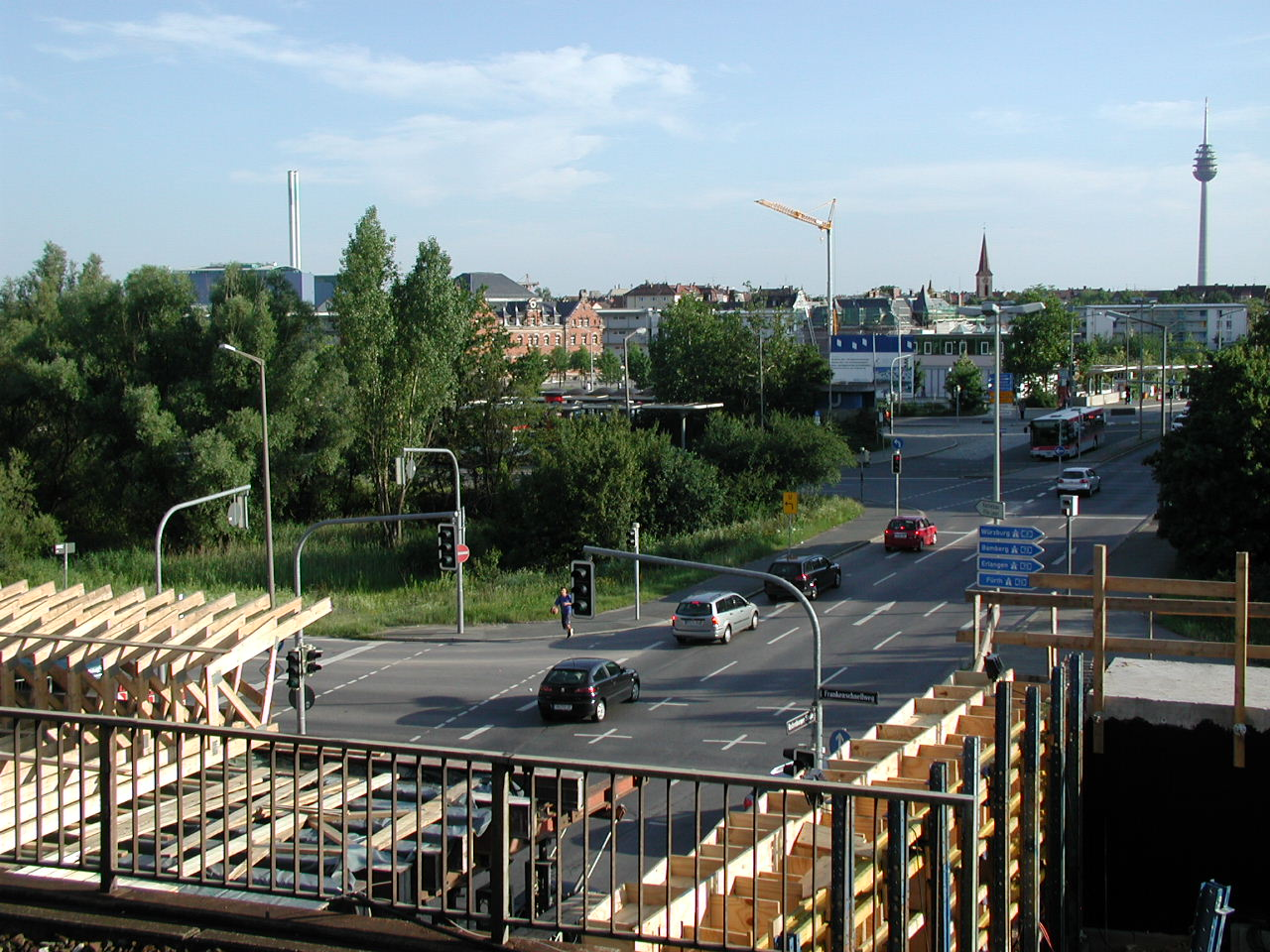 Foto vom Haltepunkt Nürnberg-Rothenburger StraßeIm Vordergrund: Baustelle der S-Bahn Nürnberg, Brücke über die Rothenburger Straße, die Kreuzung der Rothenburger Straße mit dem Frankenschnellweg, dahinter der U-Bahn- und Busbahnhof Rothenburger Straße.Im Hintergrund: Die Nürnberger Stadtteile Sankt Leonhard und Schweinau sowie der Nürnberger Fernsehturm.